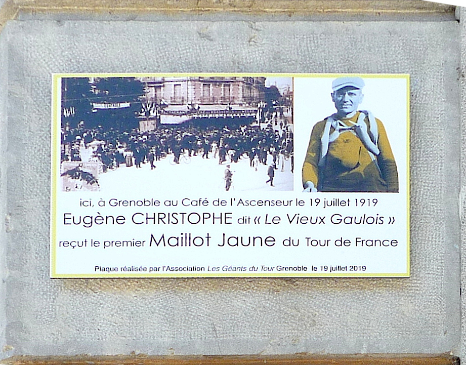 Plaque à l'angle du boulevard Gambetta et de la rue Béranger, célébrant le centième anniversaire de la remise du premier maillot jaune sur un Tour de France le 19 juillet 1919, lors du départ de la onzième étape, Grenoble-Genève.